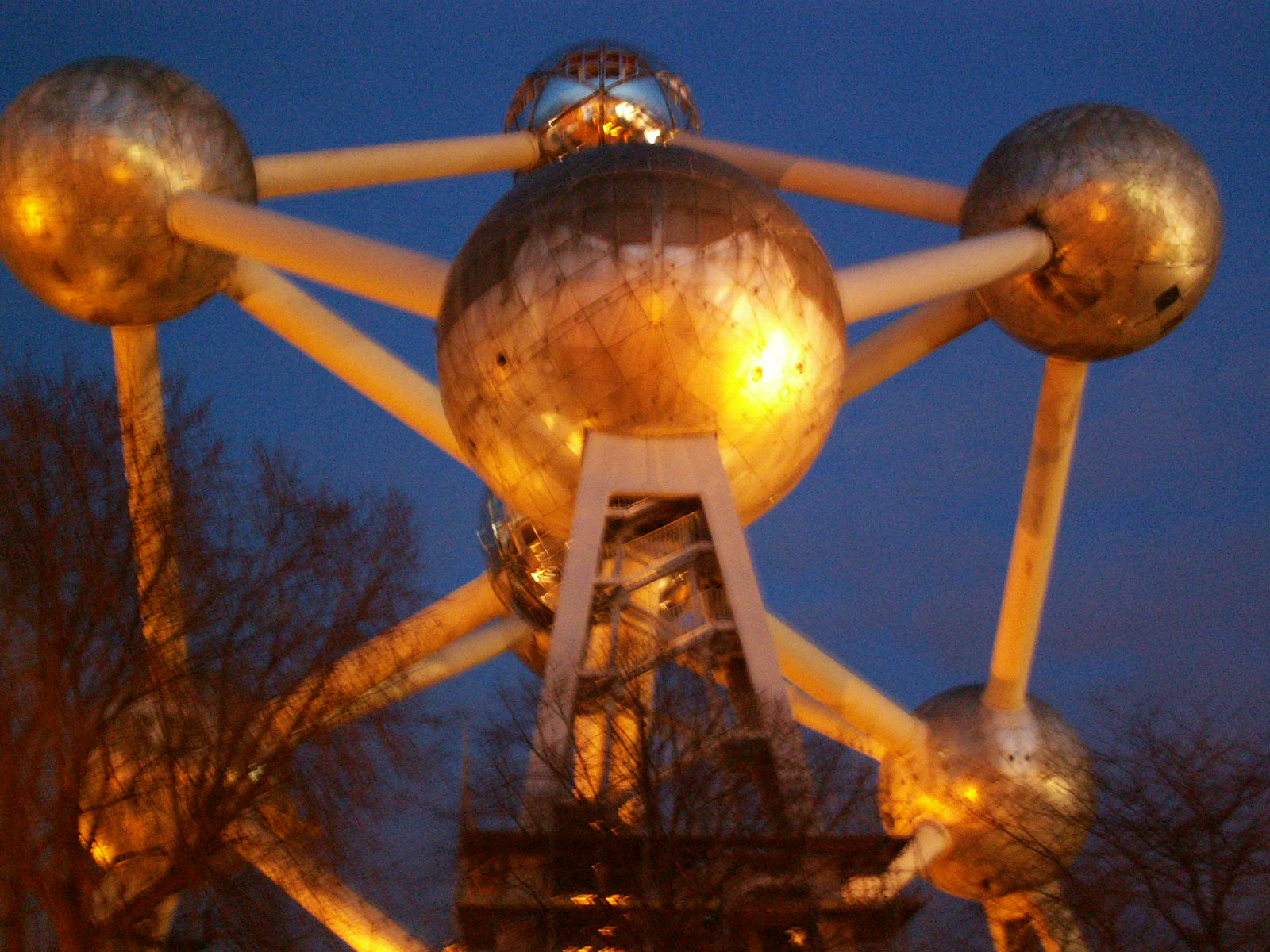 A brüsszeli Atomium éjjel